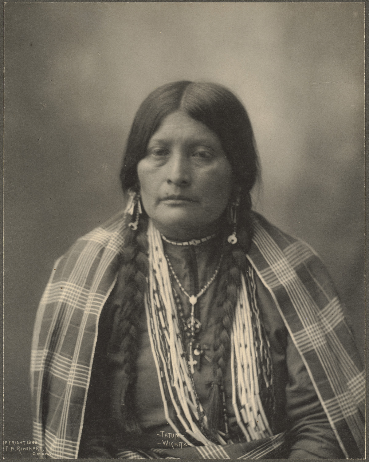 Tatum, Wichita